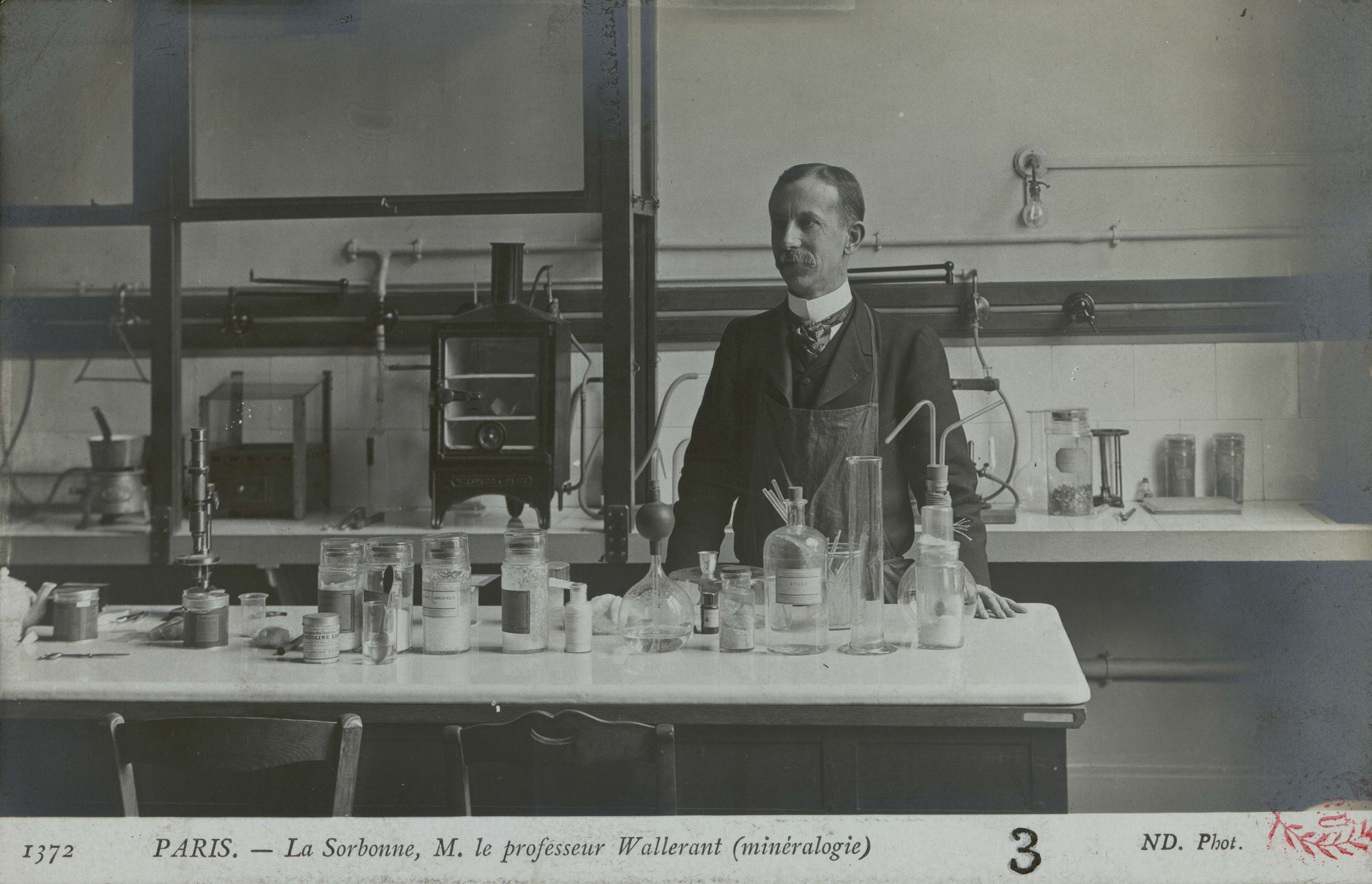 Carte postale photographique